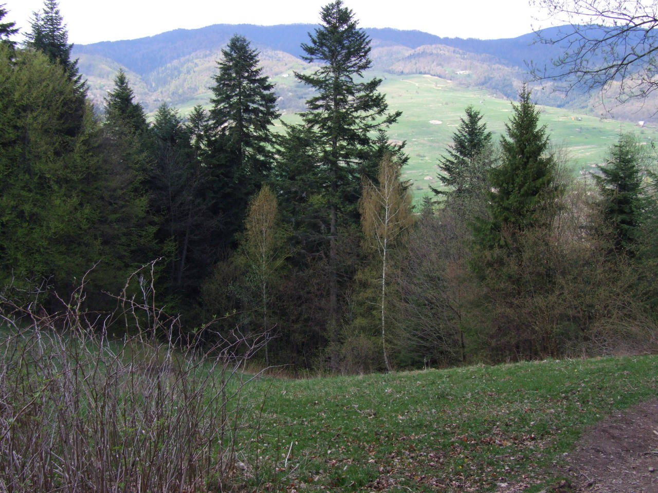 Polana Mały Sossnów